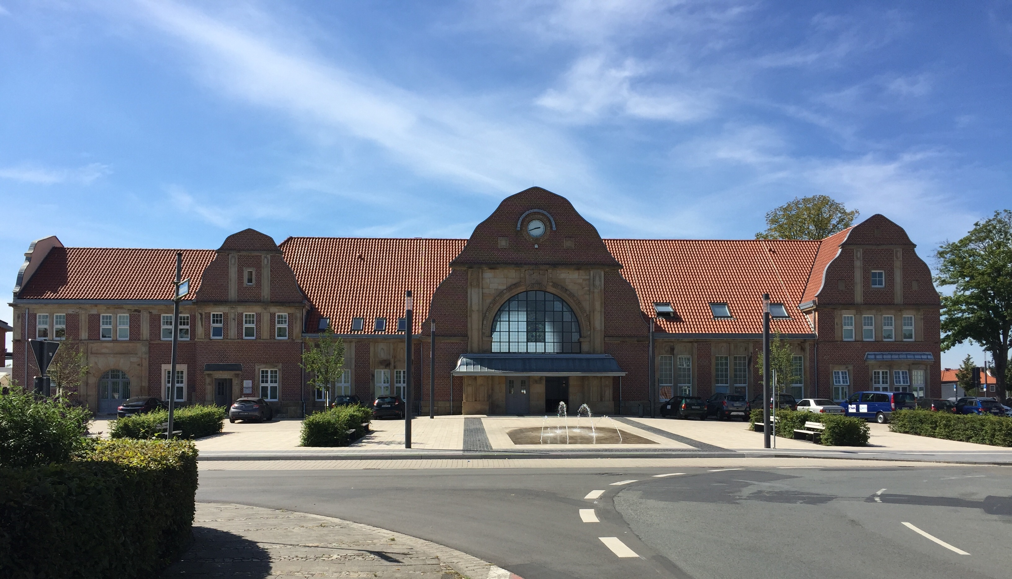 Der Quakenbrücker Bahnhof nach der Sanierung im Jahr 2016.